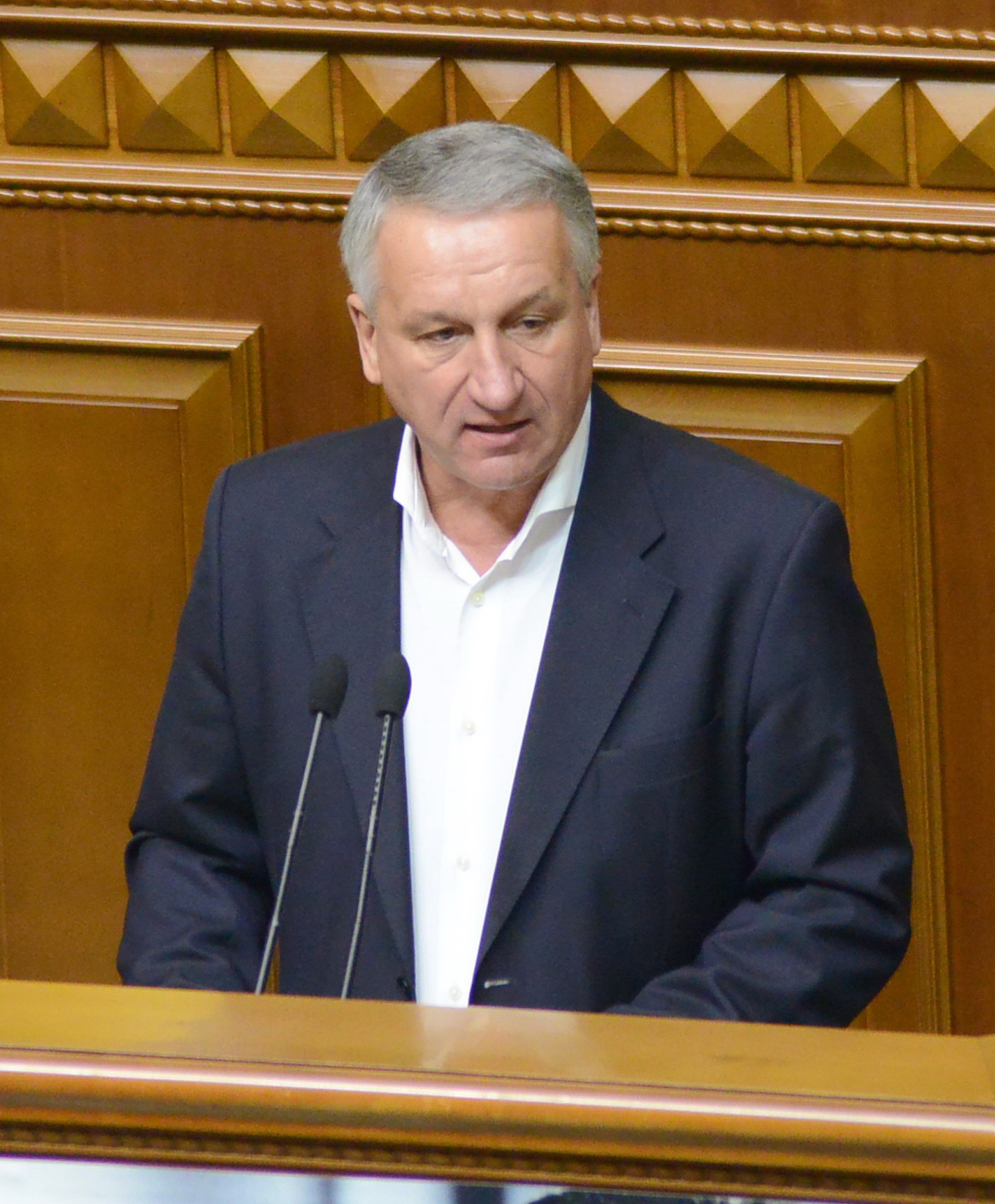 ВЕРХОВНА РАДА УКРАЇНИ 2015 фотограф Вадим Чуприна